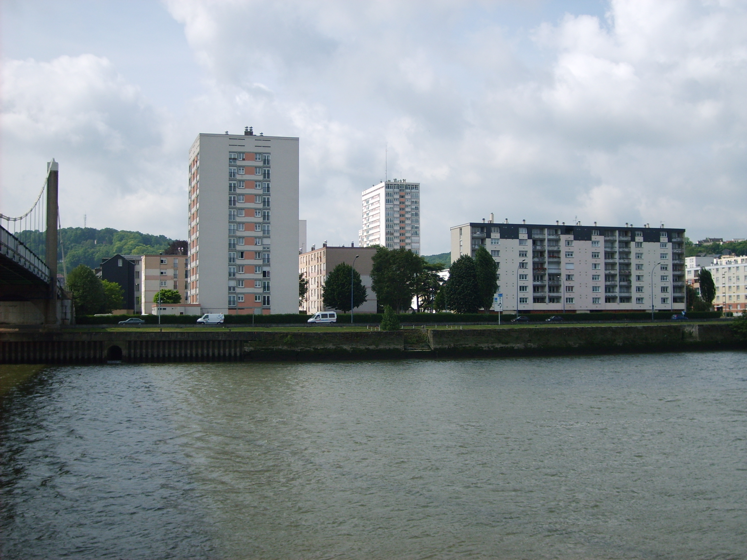 Quartier du Puchot à Elbeuf, Seine-Maritime, France. Elbeuf, Seine-Maritime, France.